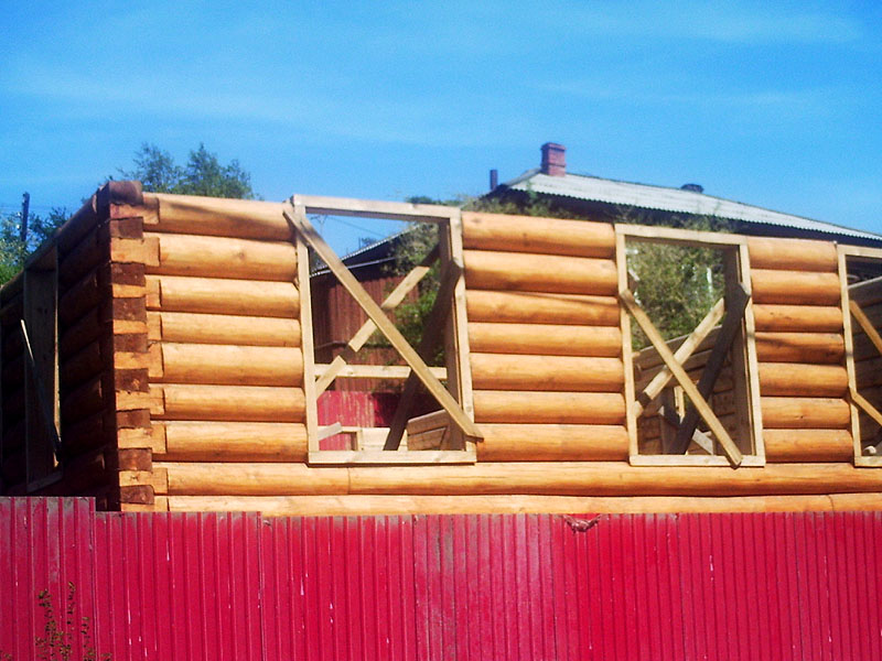 Восстановление утраченного дома в 130 квартале Иркутска